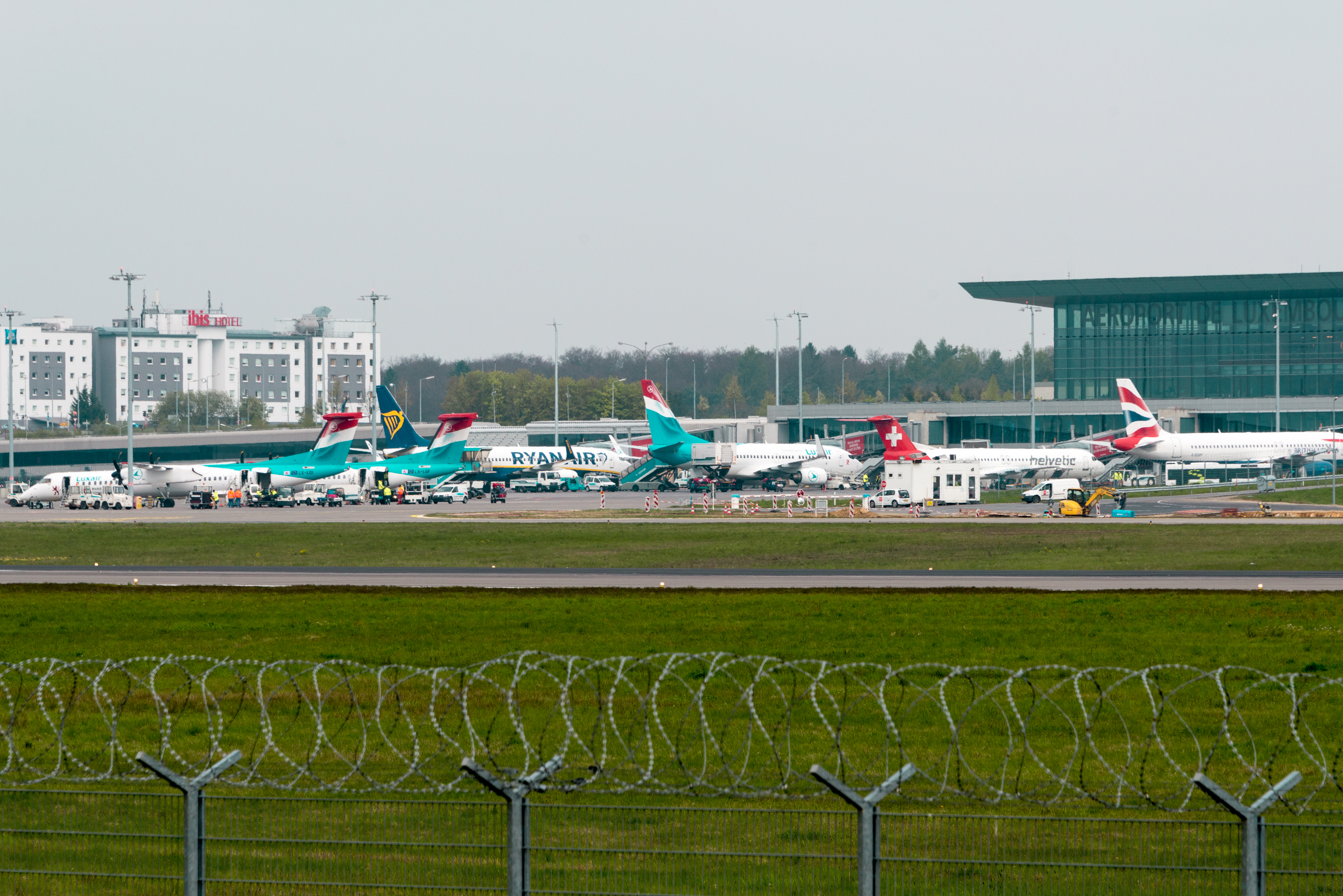 Avionen um Virfeld vum Findel.